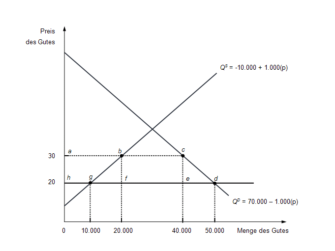 Beispiel zur Importquote